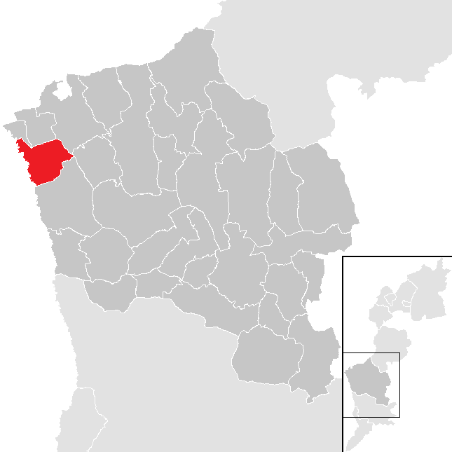 Bezirk Oberwart